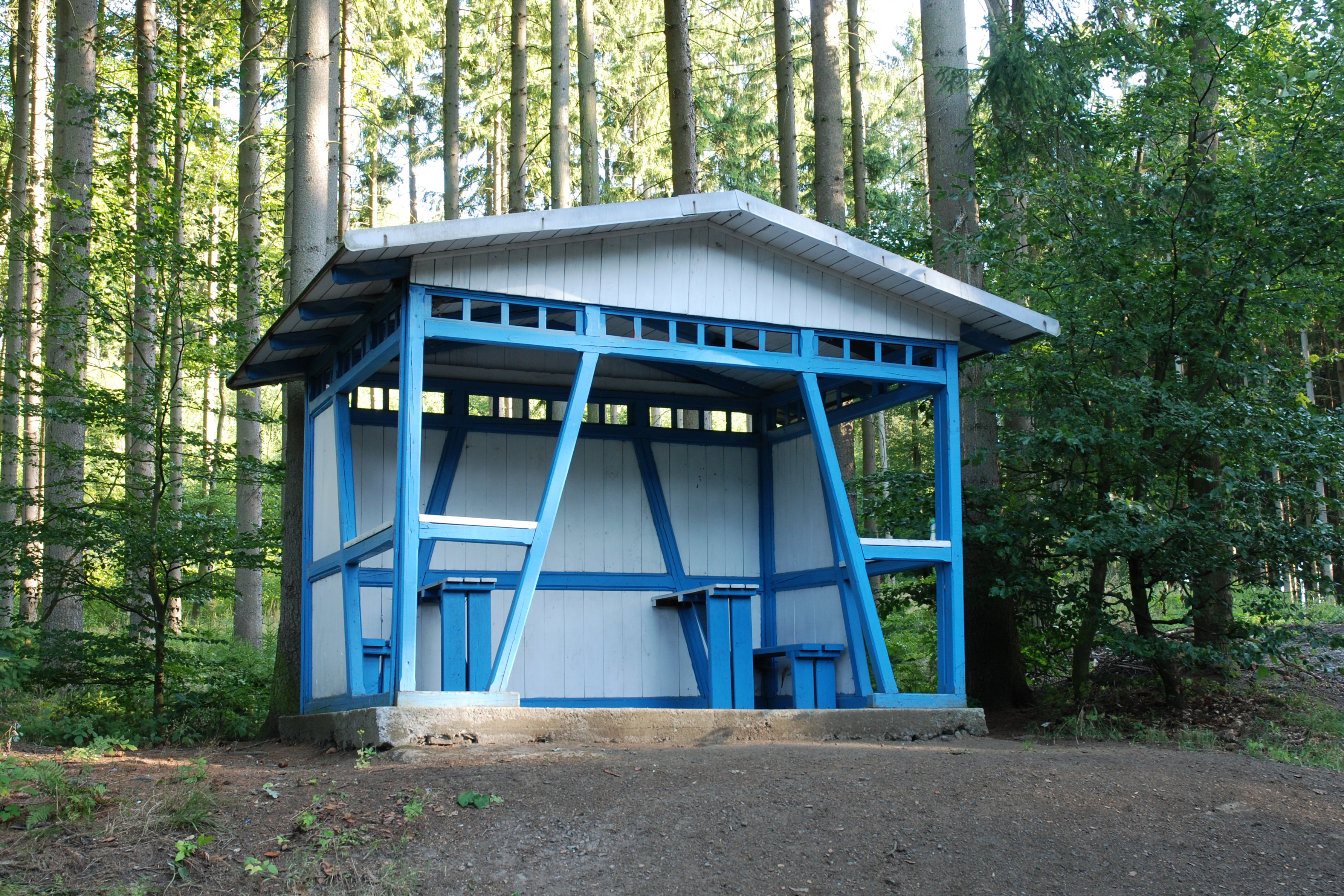 Gogolova chata v karlovarských lázeňských lesích